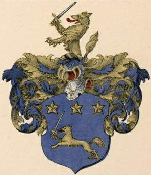 Wulfi (Aumeisteri) suguvõsa aadlivapp